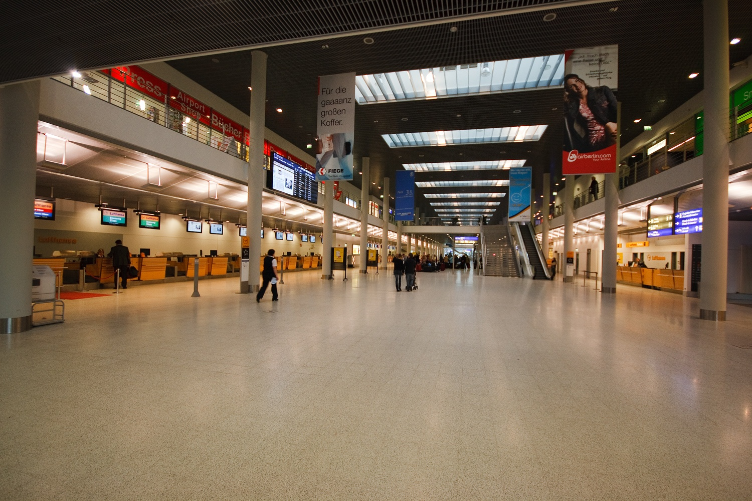 FMO, Datum/Uhrzeit: 14.03.2009 16:06:01